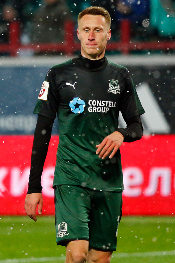 «Локомотив» - «Краснодар»